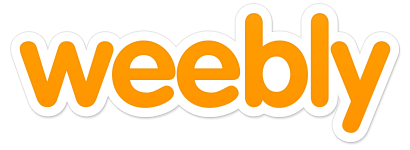 Logo of website builder Weebly, as of 2013